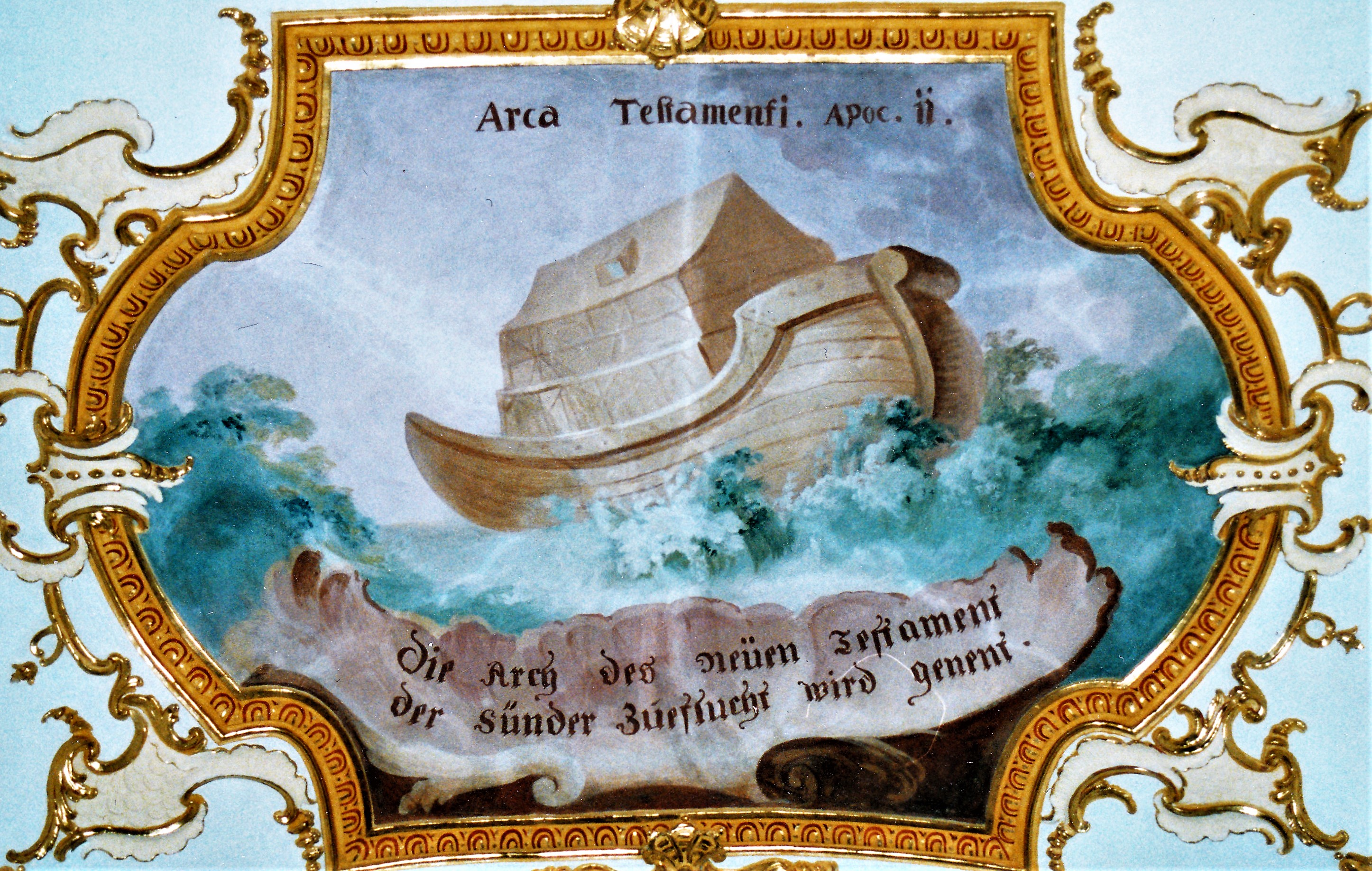 Maria Brünnlein - Fresko von Johann Baptist Zimmermann: Arca testamenti (Arche des Bundes)